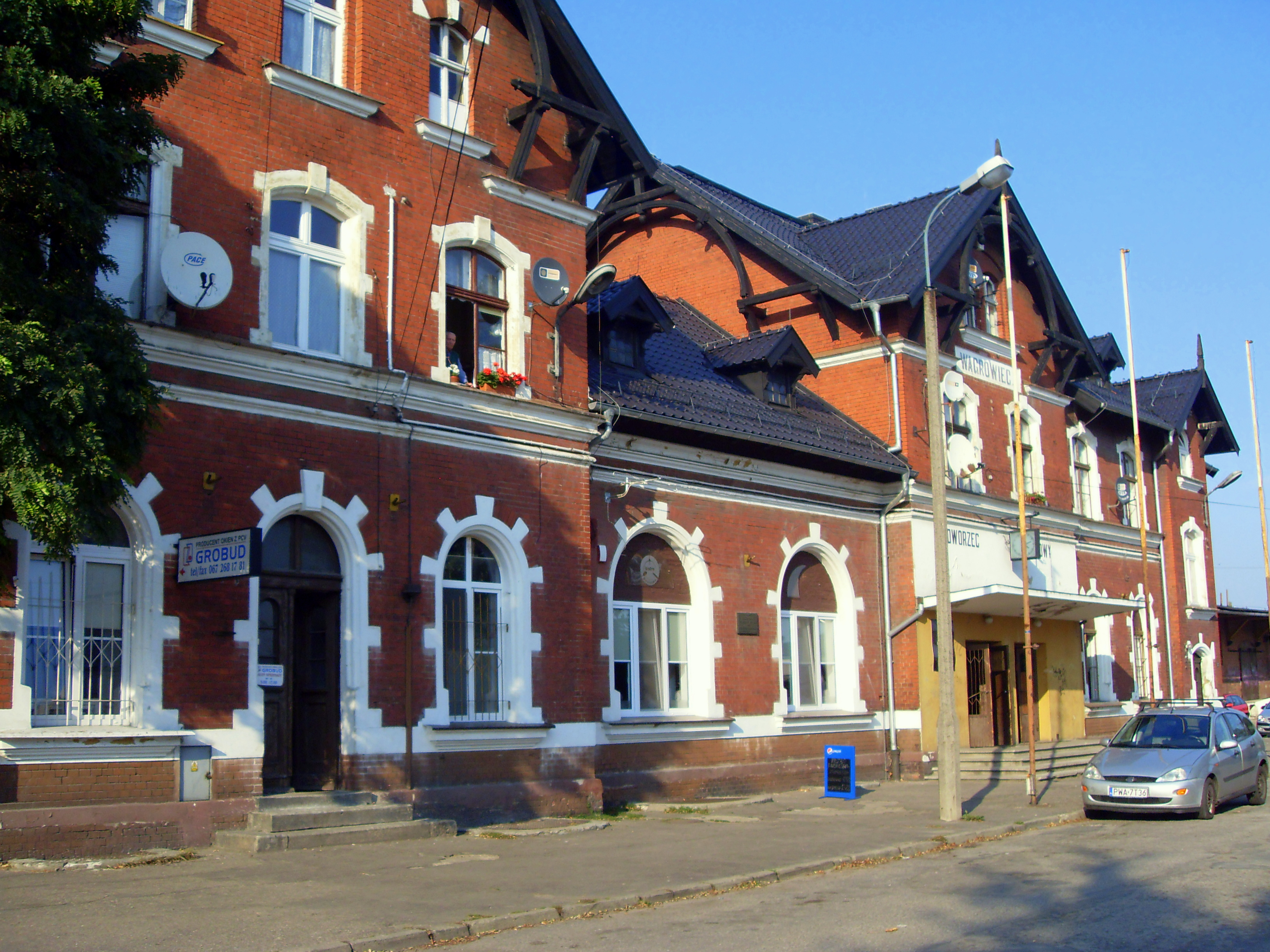 Dworzec kolejowy w Wągrowcu